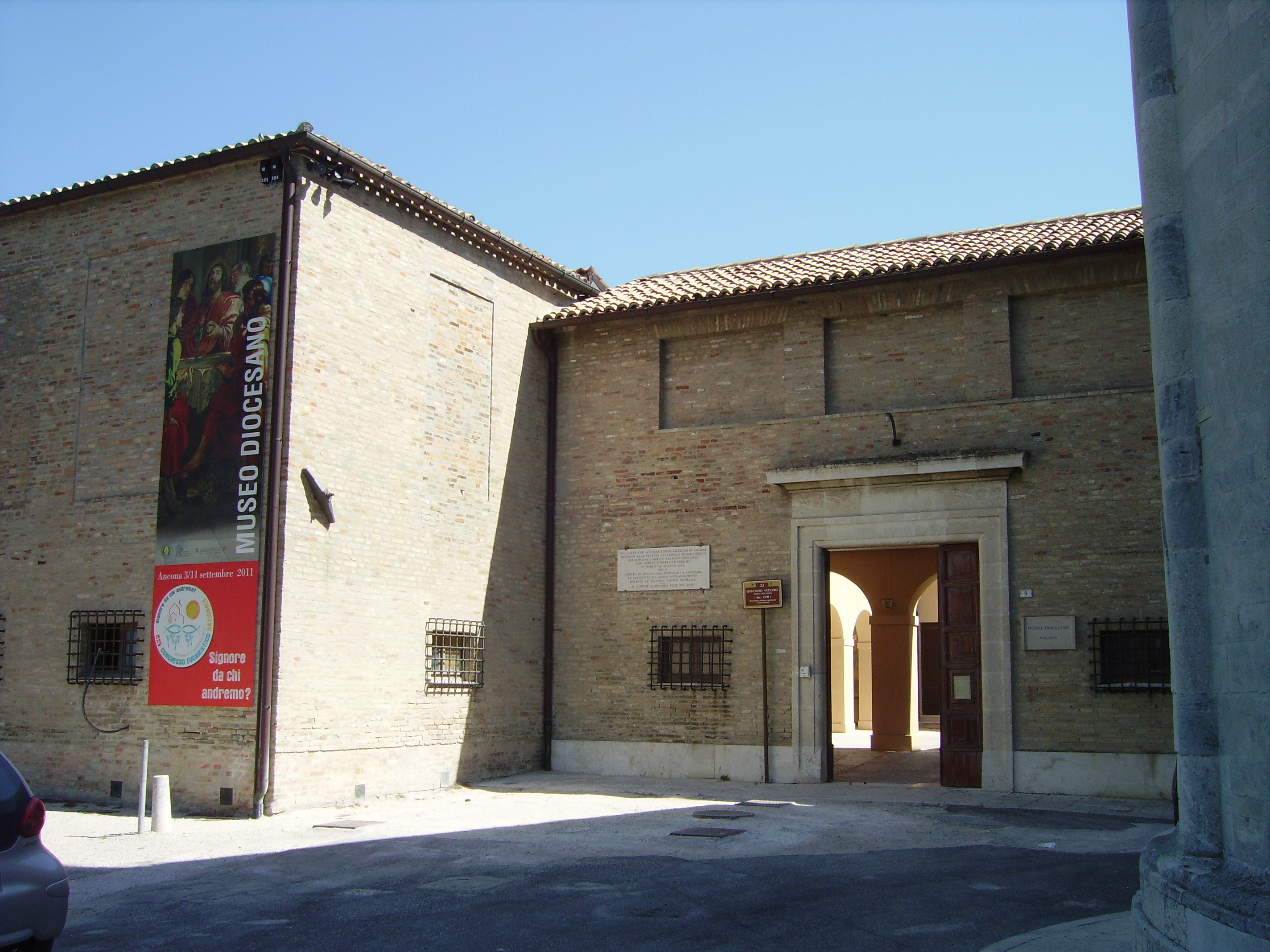 Ingresso del Museo diocesano di Ancona.